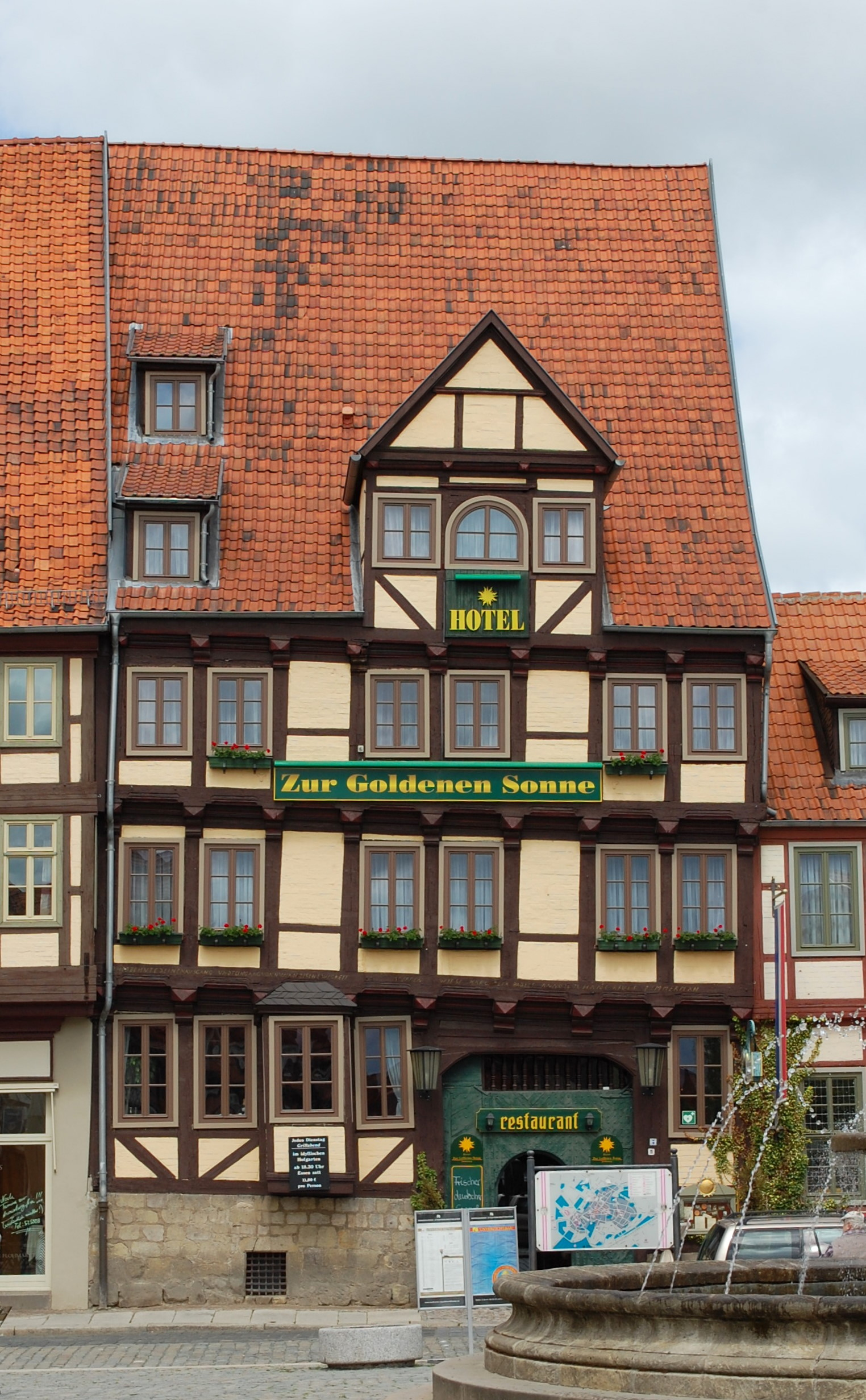 Haus im Steinweg in Quedlinburg